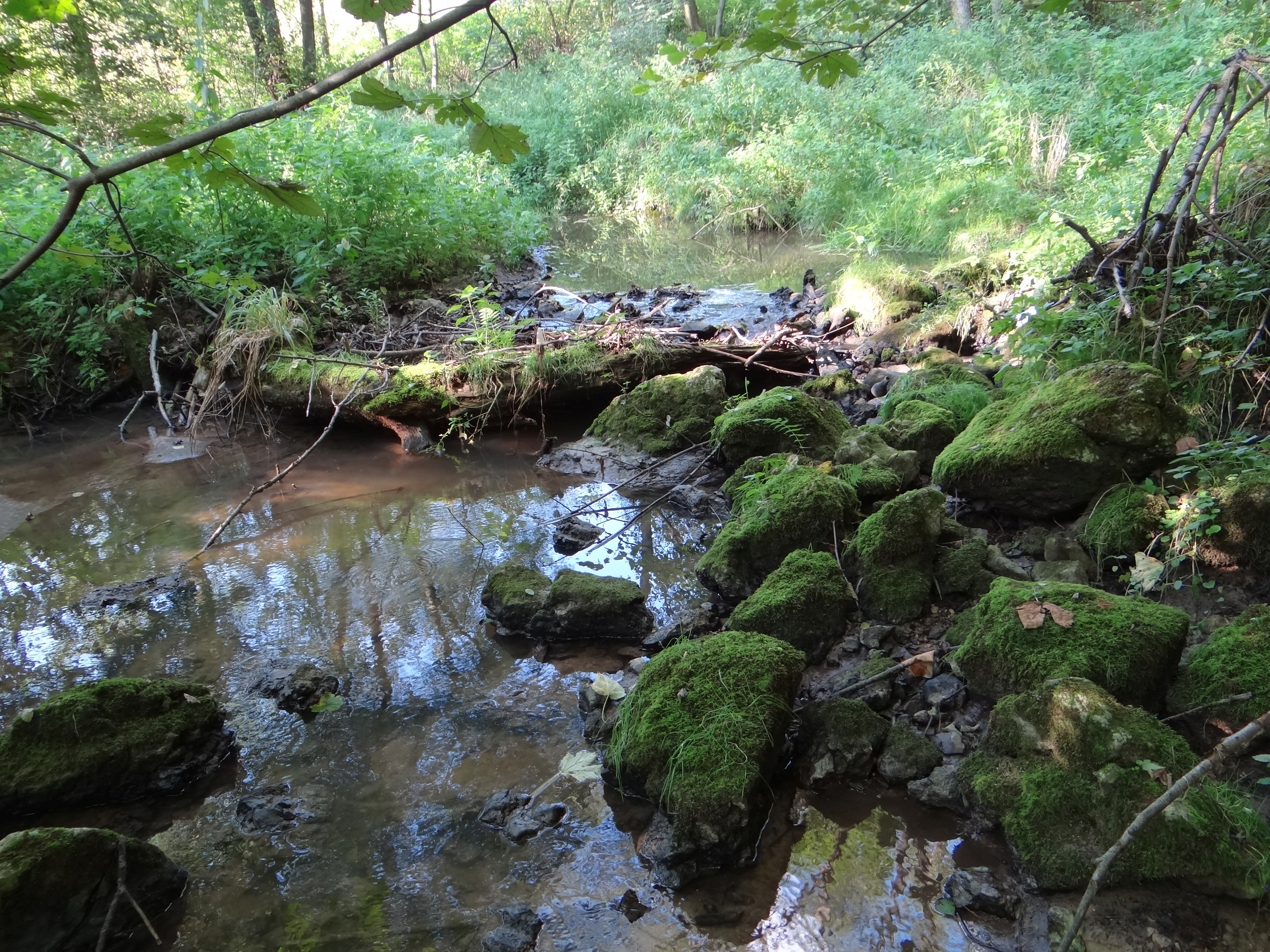 Rudno (stream) in Rybna